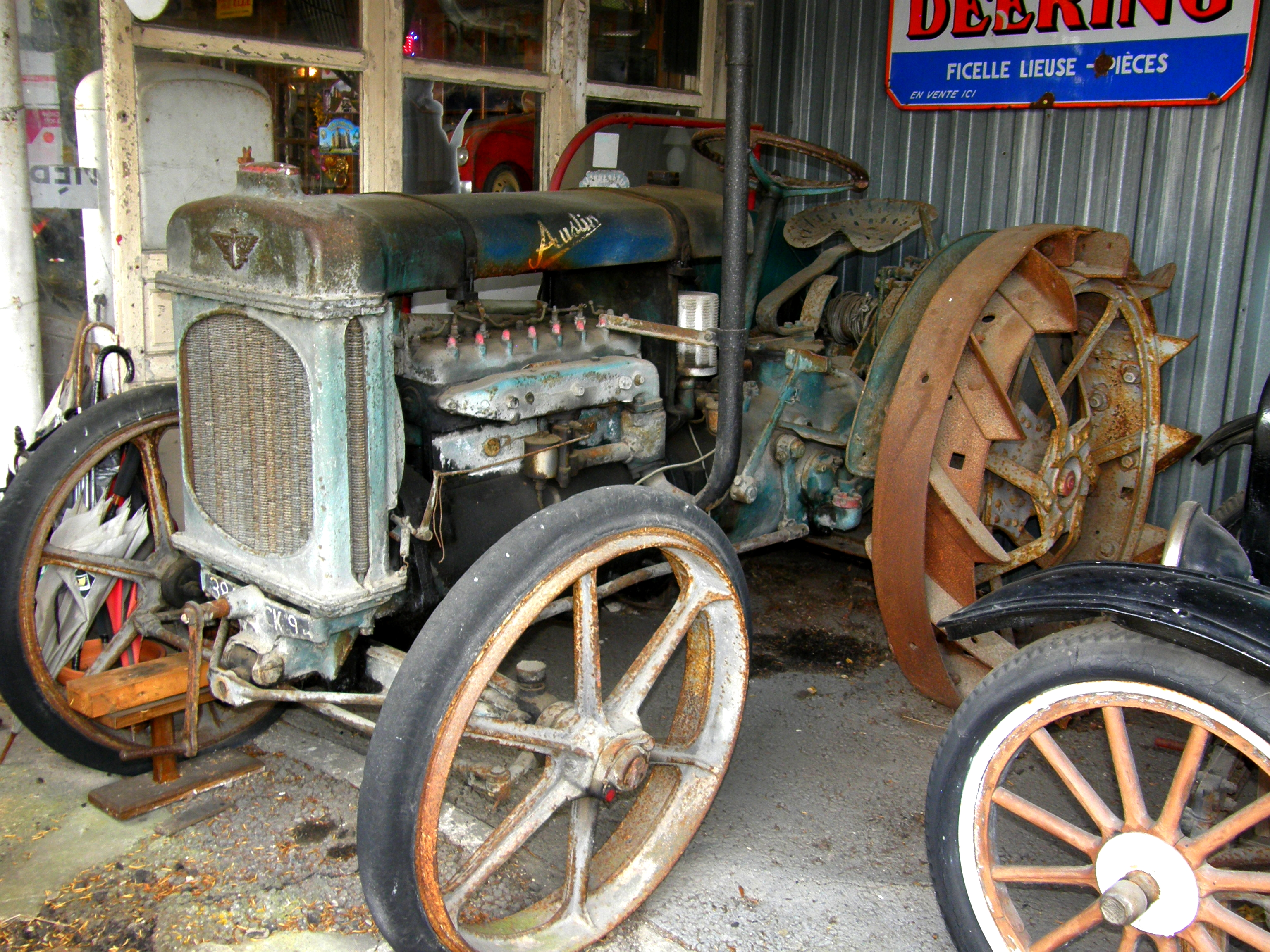 Ancien Tracteur de la marque anglaise Austin produit vers 1930. Musée Populaire 86440 Migné-Auxance (France)